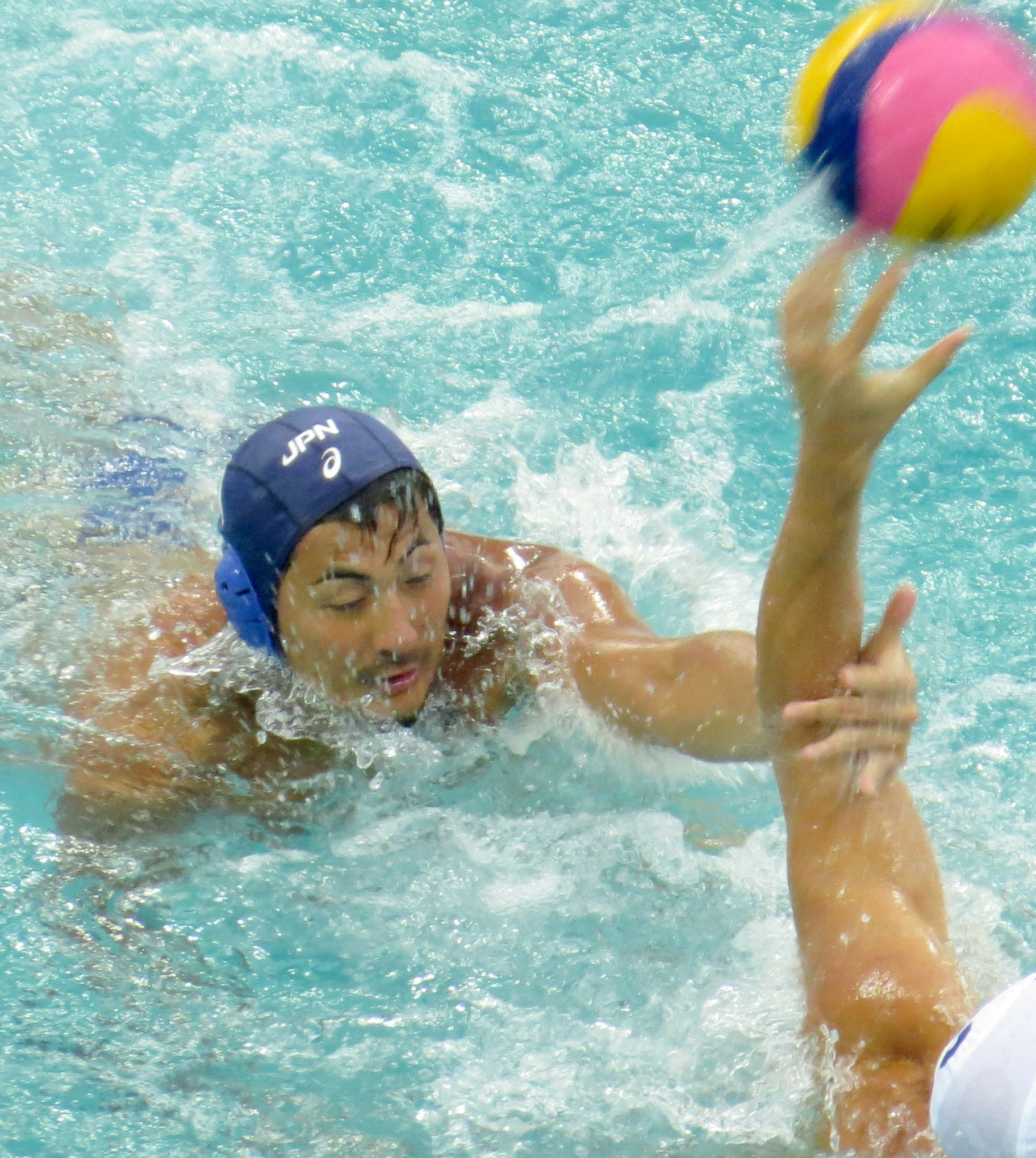 Rio 2016. Polo aquatico. sx50 17